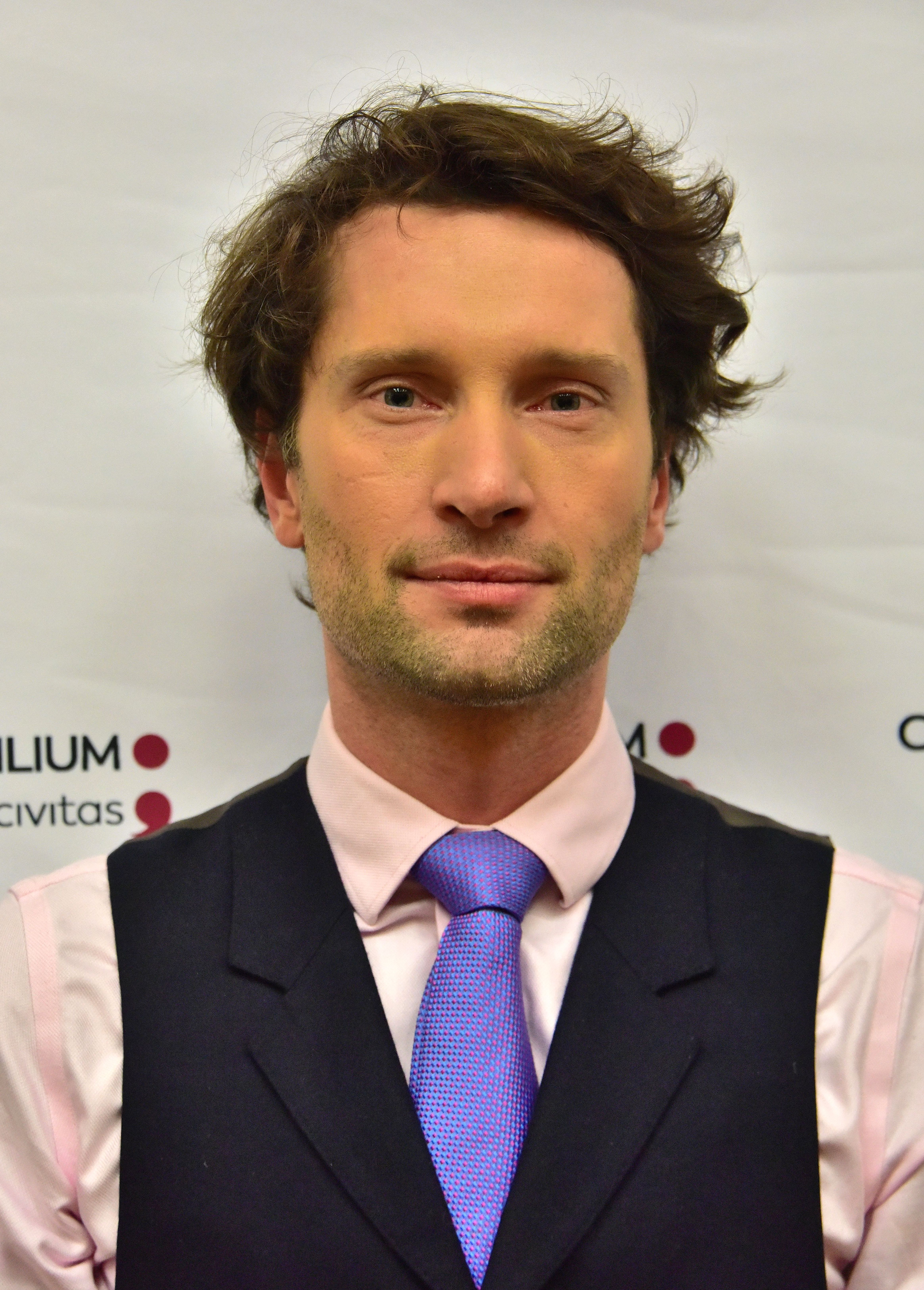 Profesor Michał Kosiński (Stanford University) podczas wykładu w Collegium Civitas w Warszawie